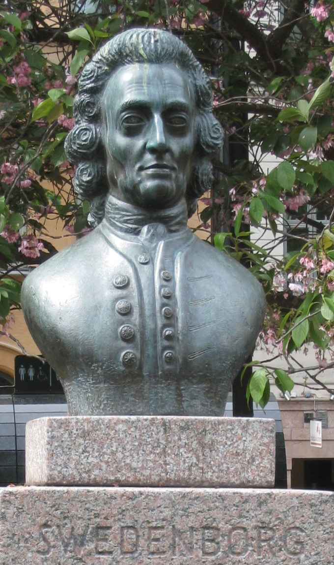 Emanuel Swedenborg (1688-1772), bronsbyst utförd av skulptören Gustav Nordahl (1973), Mariatorget, Södermalm, Stockholm.